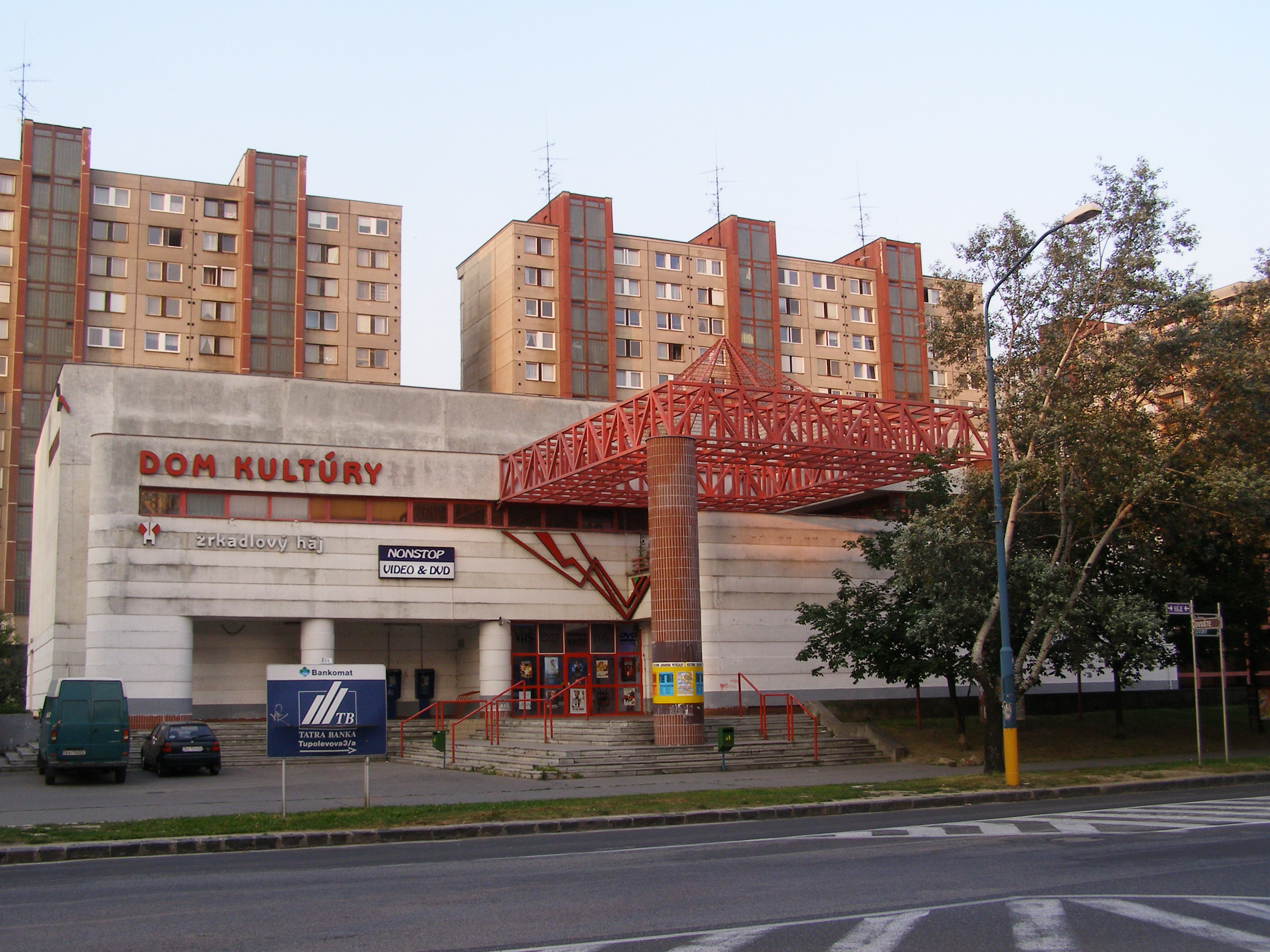 Culture House Zrkadlový háj, Petržalka, Bratislava